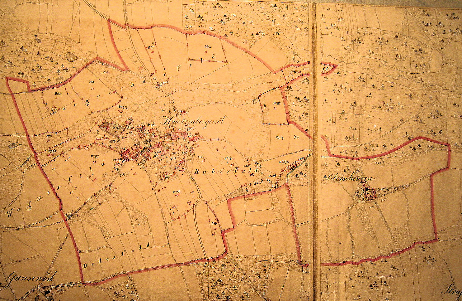 Haunzenbergersöll 1849 Gemeindekarte Kataster Gemeinde Bodenkirchen Felder Dorf Karte historisch Zeichnung Oberscheuern